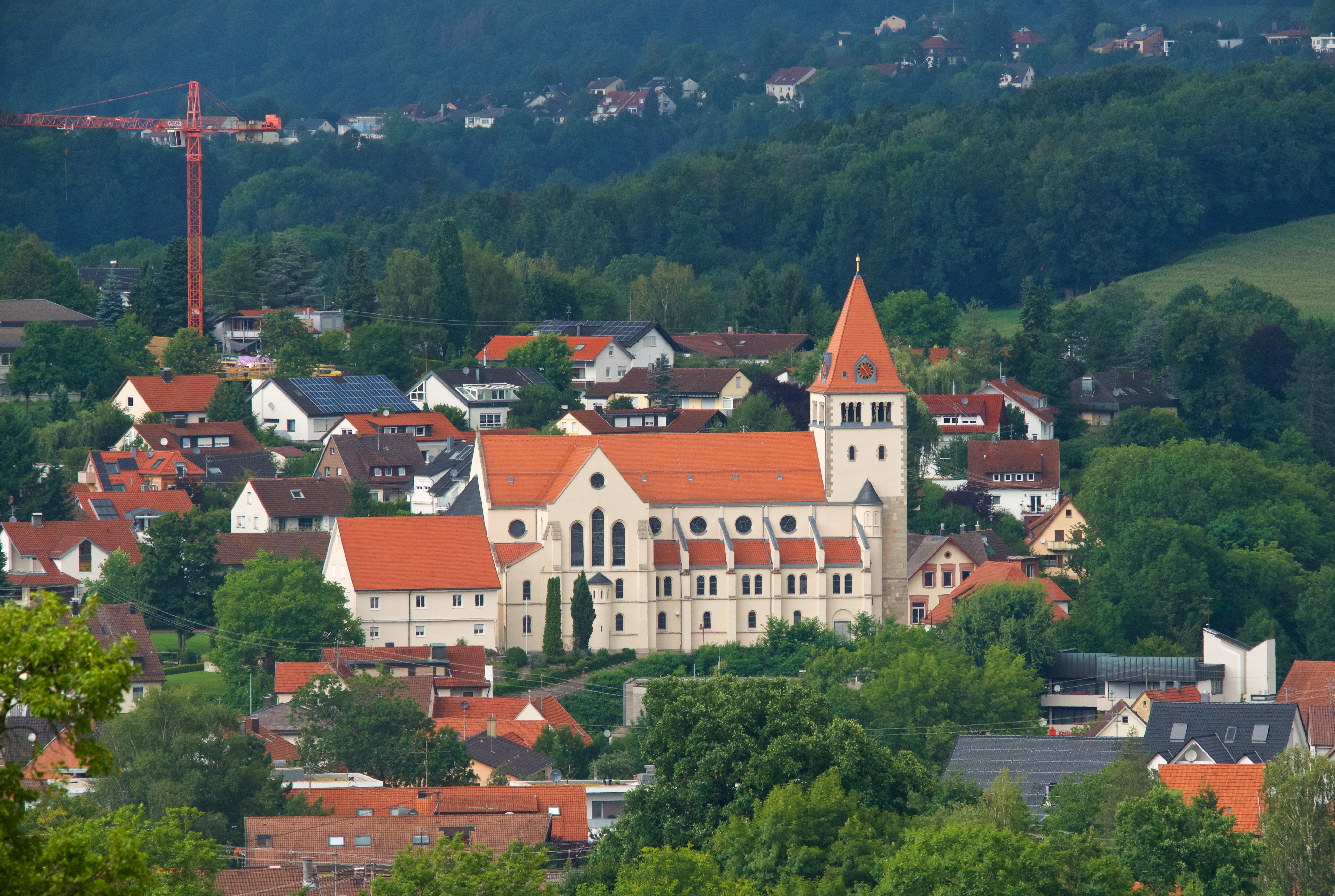 Kirche St. Laurentius